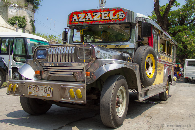 Jeepney-Kühlergrill